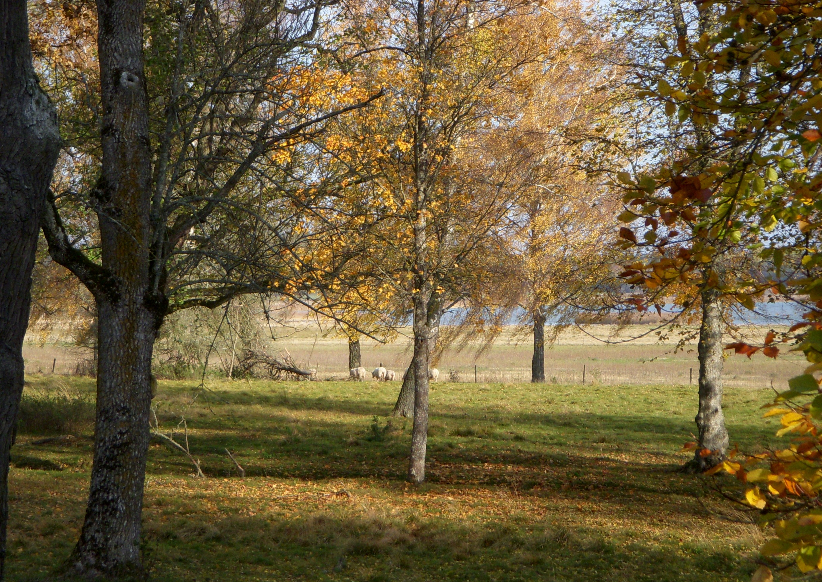 Tullgarns naturreservat norr om Tullgarns slott